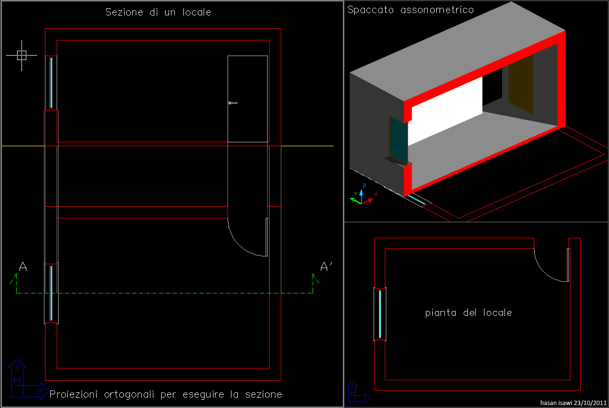 sezione verticale di un manufatto architettonico